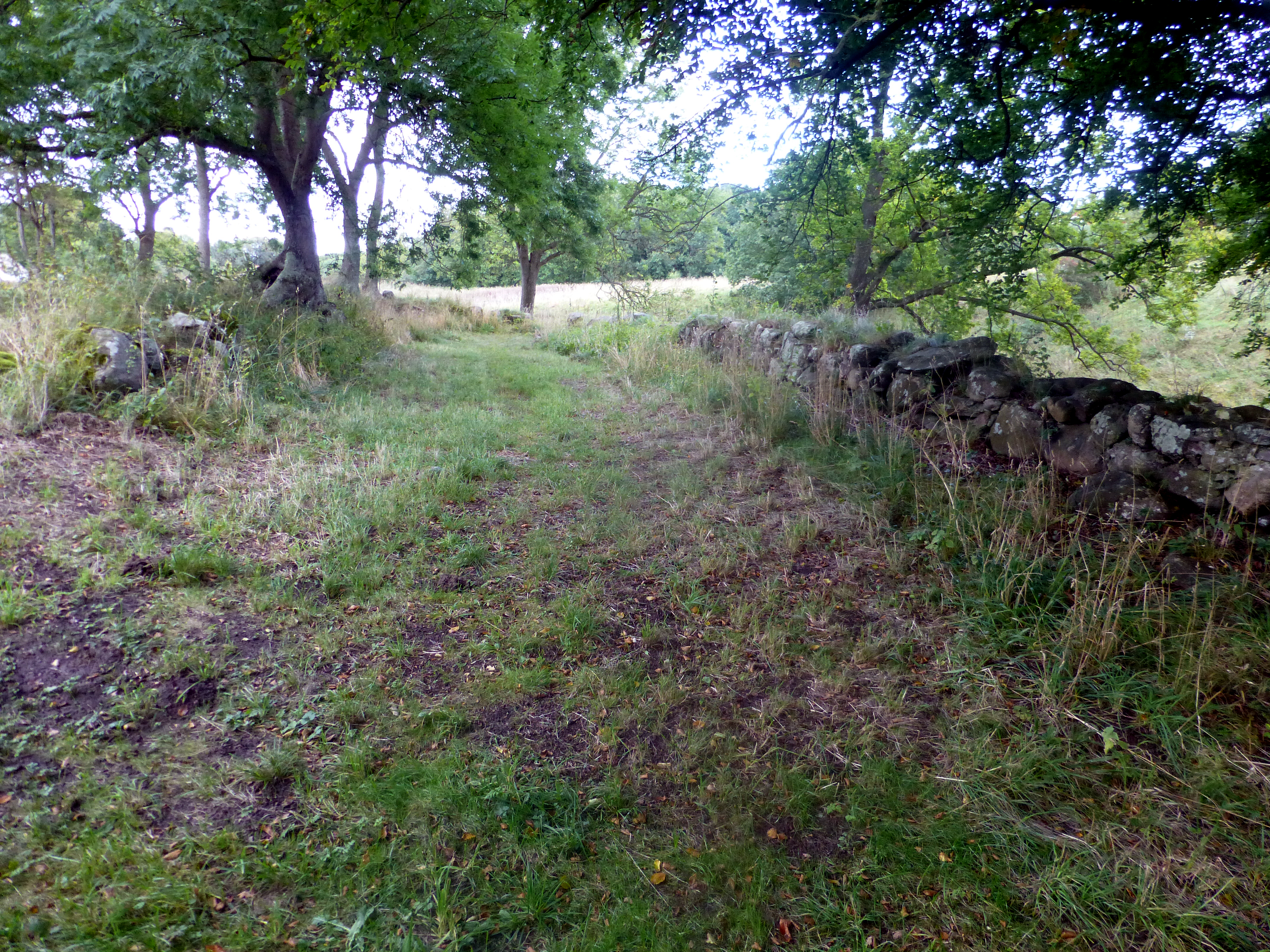 Skovgaarde Voldsted sydfløjen set fra vest